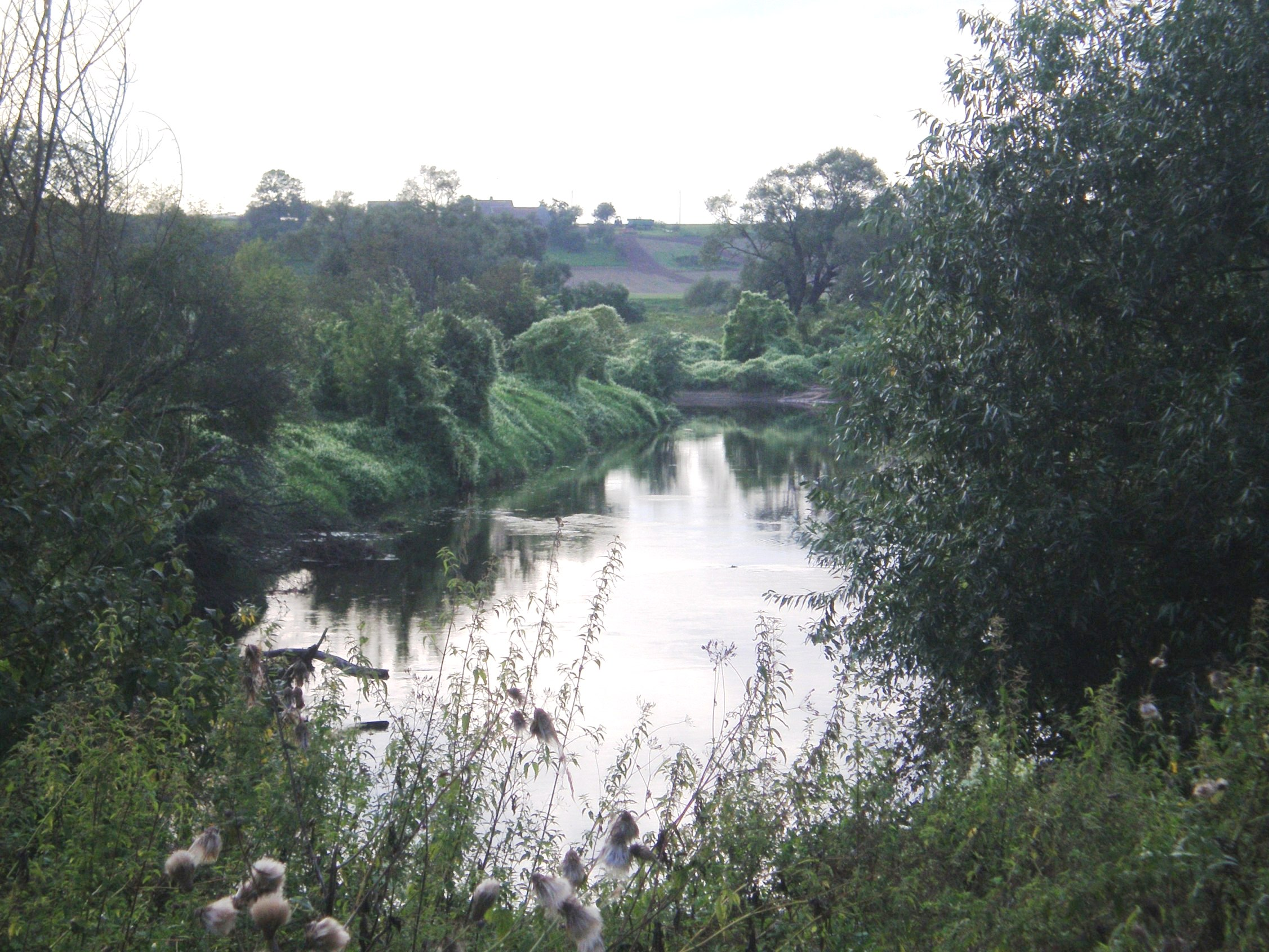 Nevėžis ties Pašiliais, Kėdainių raj.